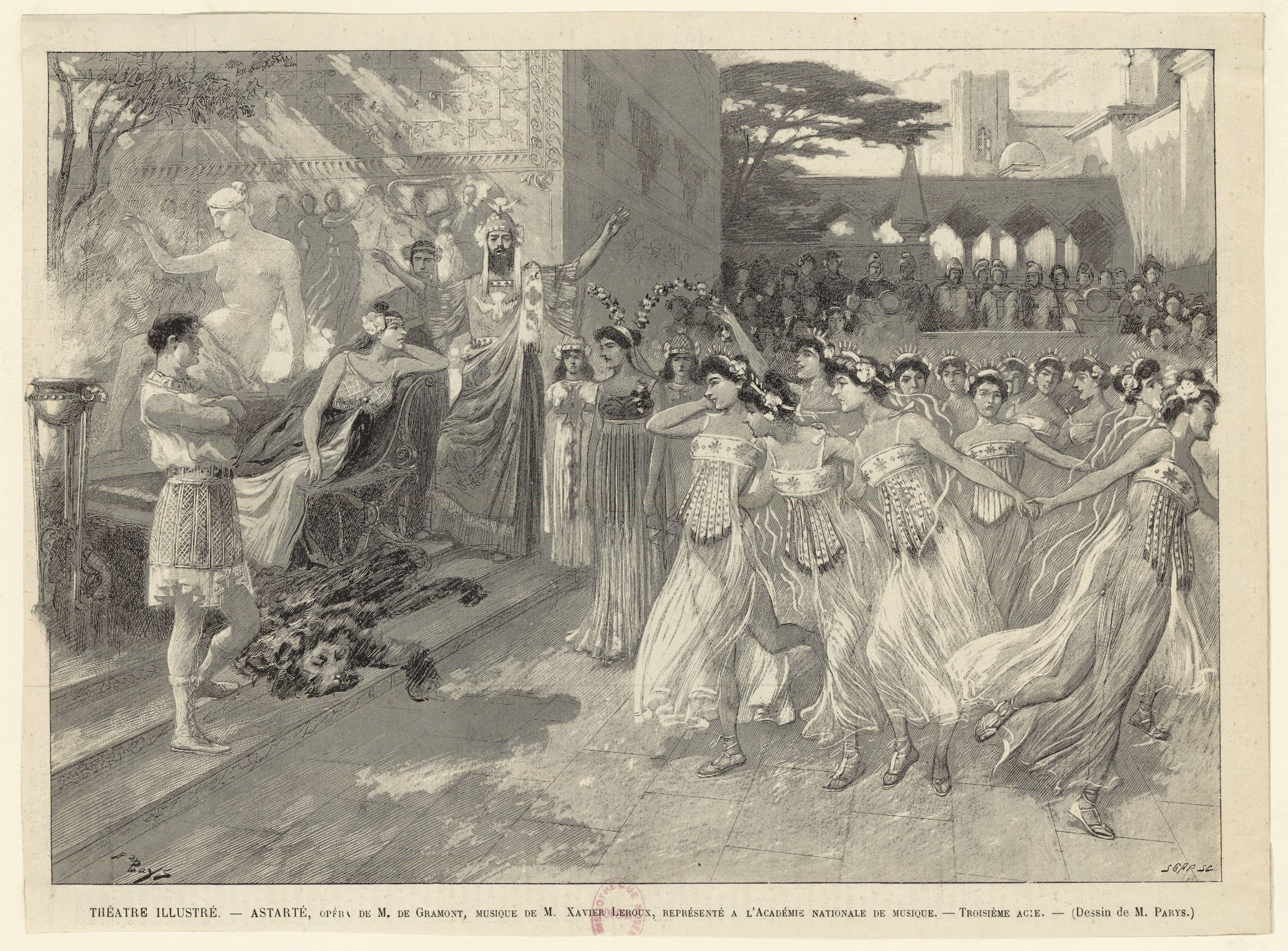 Astarté, opéra, livret de M. de Gramont, musique de Xavier Leroux, représenté à l'Académie nationale de musique. Troisième acte : estampe, SGAP sc ; Dessin de M. Parys